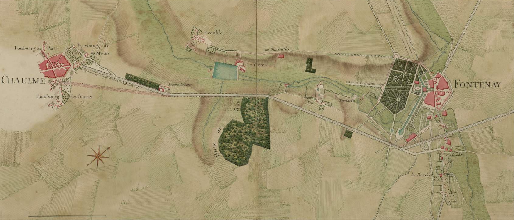 Atlas de Trudaine pour la généralité de Paris. Département de Compiègne. N° 12. Route de Melun à La-Ferté-Milon par Meaux. Portion de route partant de Chaumes-en-Brie ("Chaulme") et conduisant à Fontenay-en-Brie.